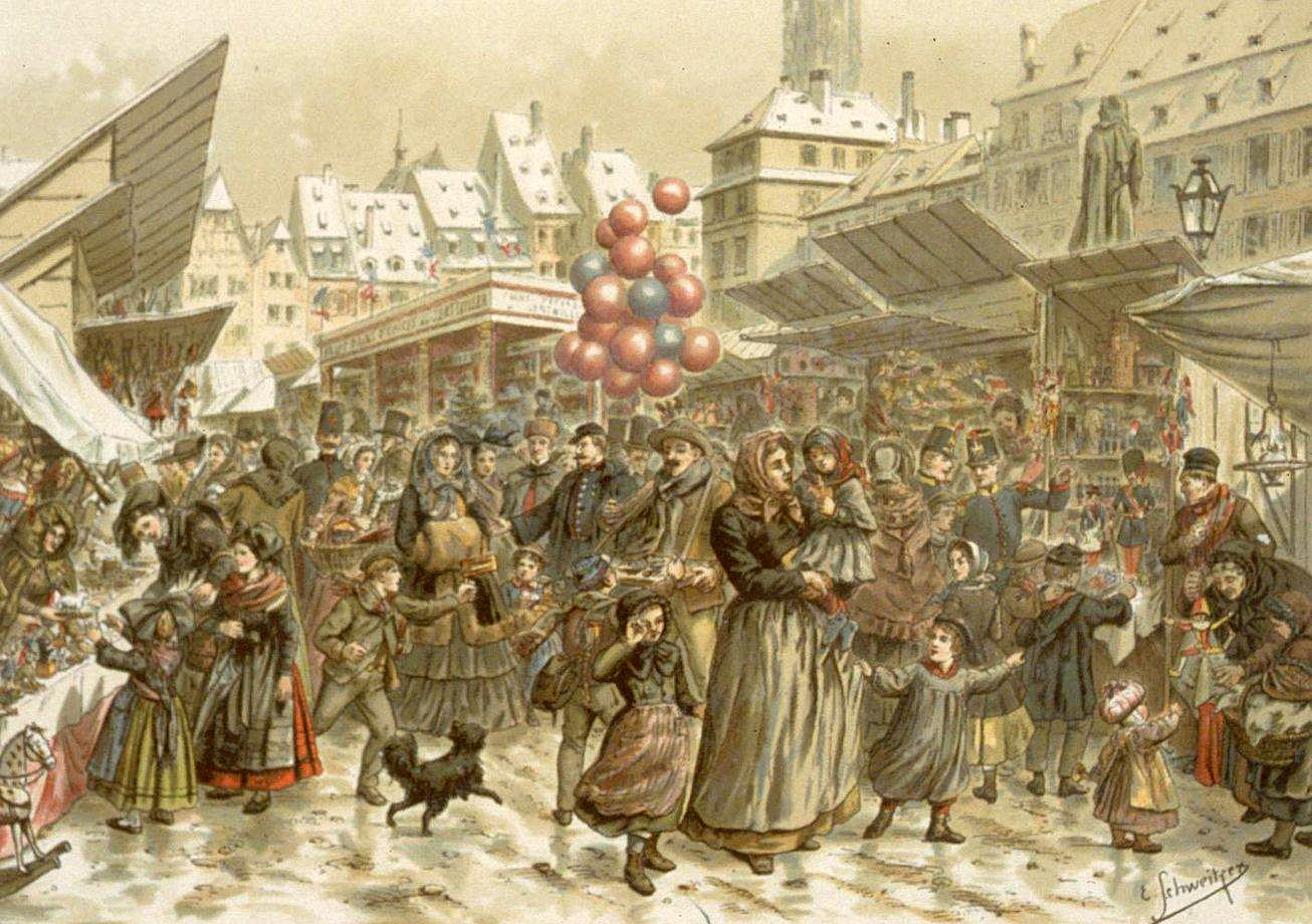 Foire de Noël, sur la place Kléber, en 1859. Bibliothèque nationale et universitaire de Strasbourg